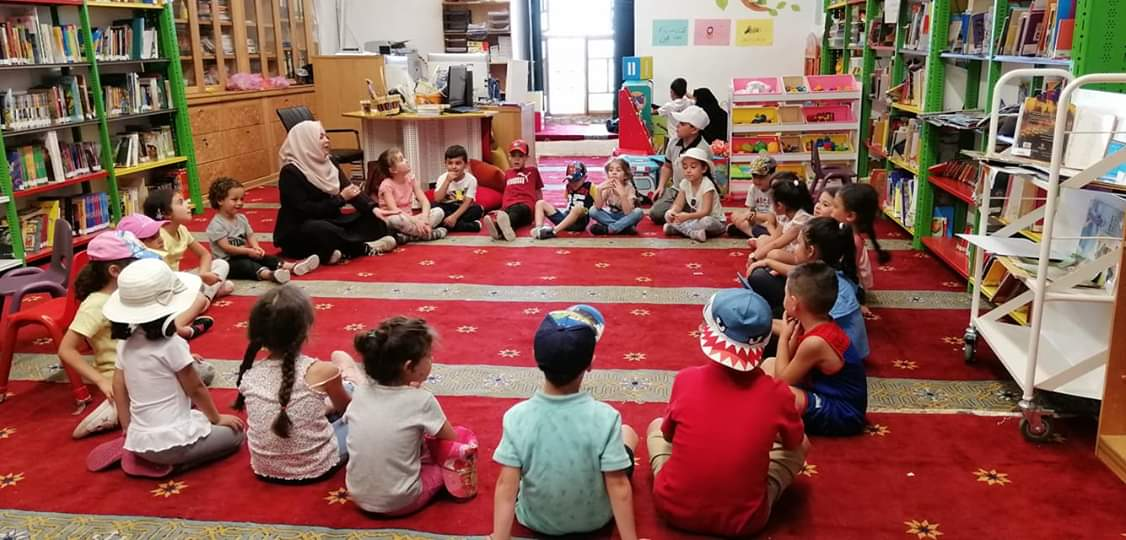 مكتبة الأطفال في المسجد الأقصى قسم مكتبة الأطفال هو جزء من مكتبة المسجد الأقصى التي تقع في الجهة الجنوبية من المسجد الأقصى مكان مسجد النساء سابقاً، وقد تم افتتاحه في عام 2016 لتوفير احتياجات السكان القوية كمؤسسة تعليمية ثقافية للفئة العمرية من عمر السّنة حتى الخامسة عشرة.